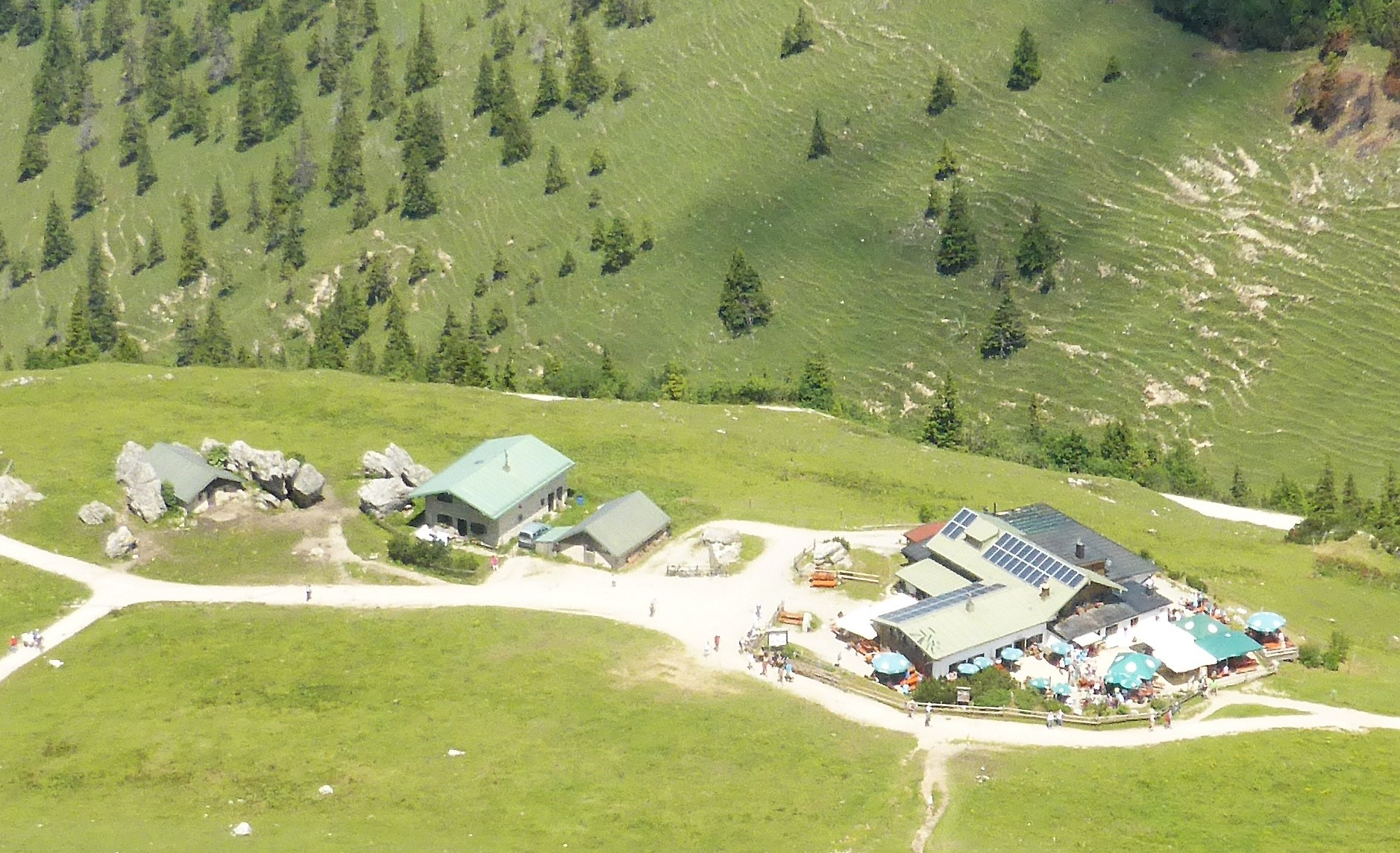 Blick vom Kampenwand-Ostgipfel auf die Steinlingalm. Chiemgauer Alpen.